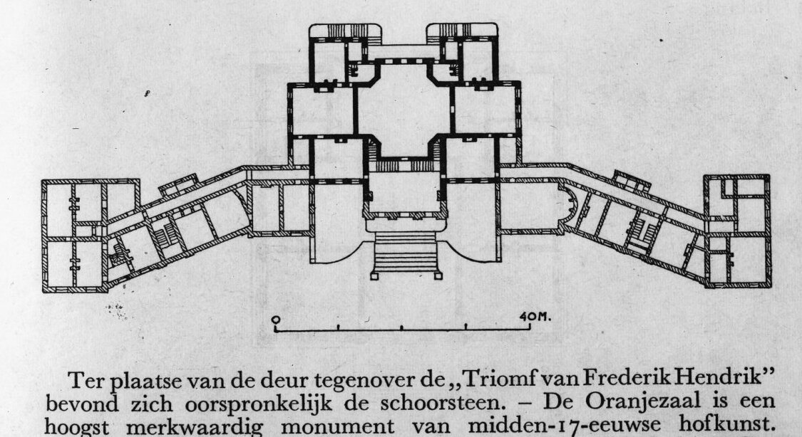 Huis ten Bosch: tekening